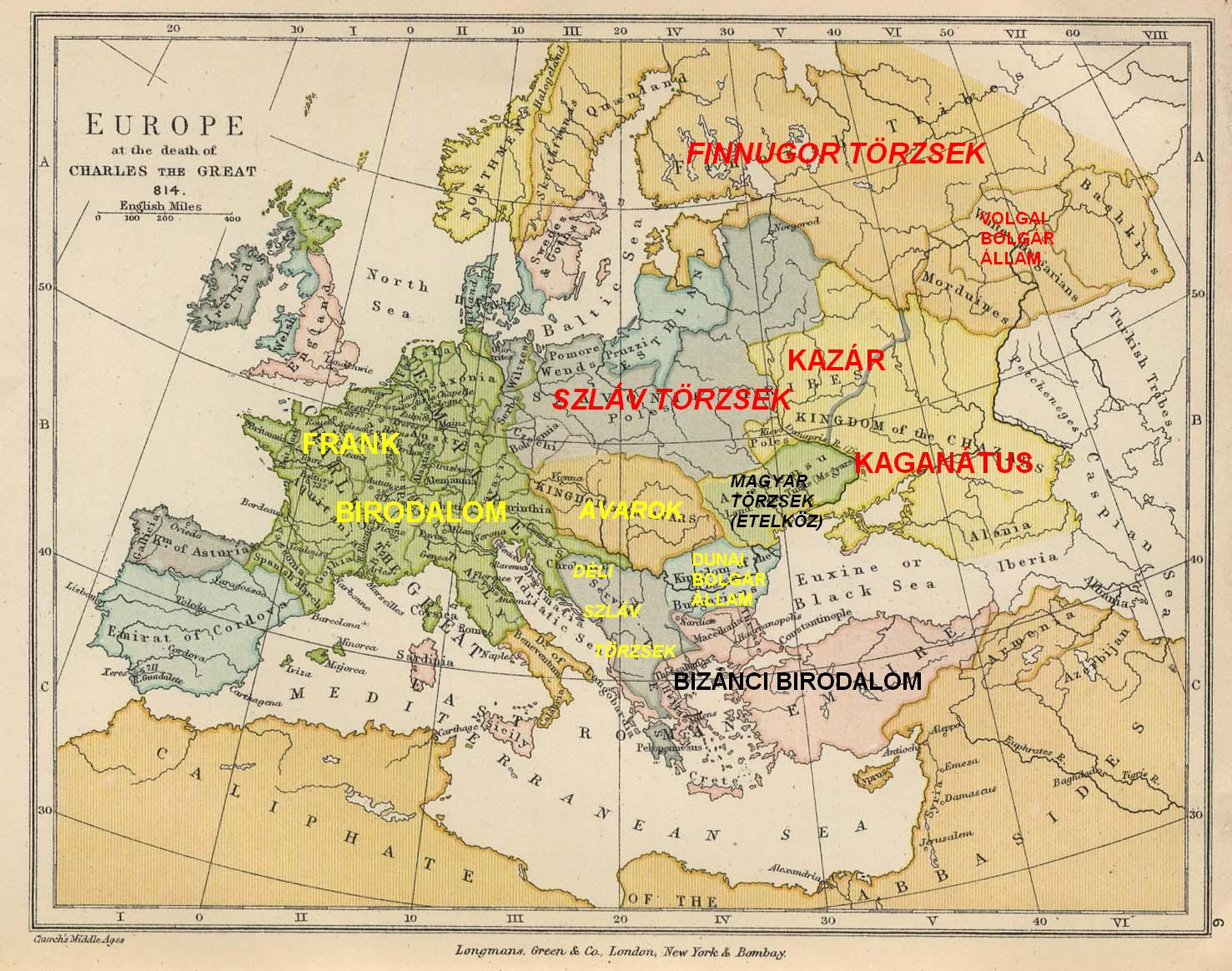 A térkép Európát mutatja Nagy Károly frank uralkodó halálakor, 814-ben